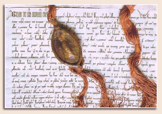 Zakládací listina města Svitav